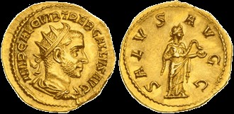 Бініо (подвійний ауреус), 251 р., золото (6,17 г.). Аверс - Требоніан Галл, IMP CAE C VIB TREB GALLVS AVG, реверс - Салус (богиня здоров’я і благополуччя), SALVS AVGG.